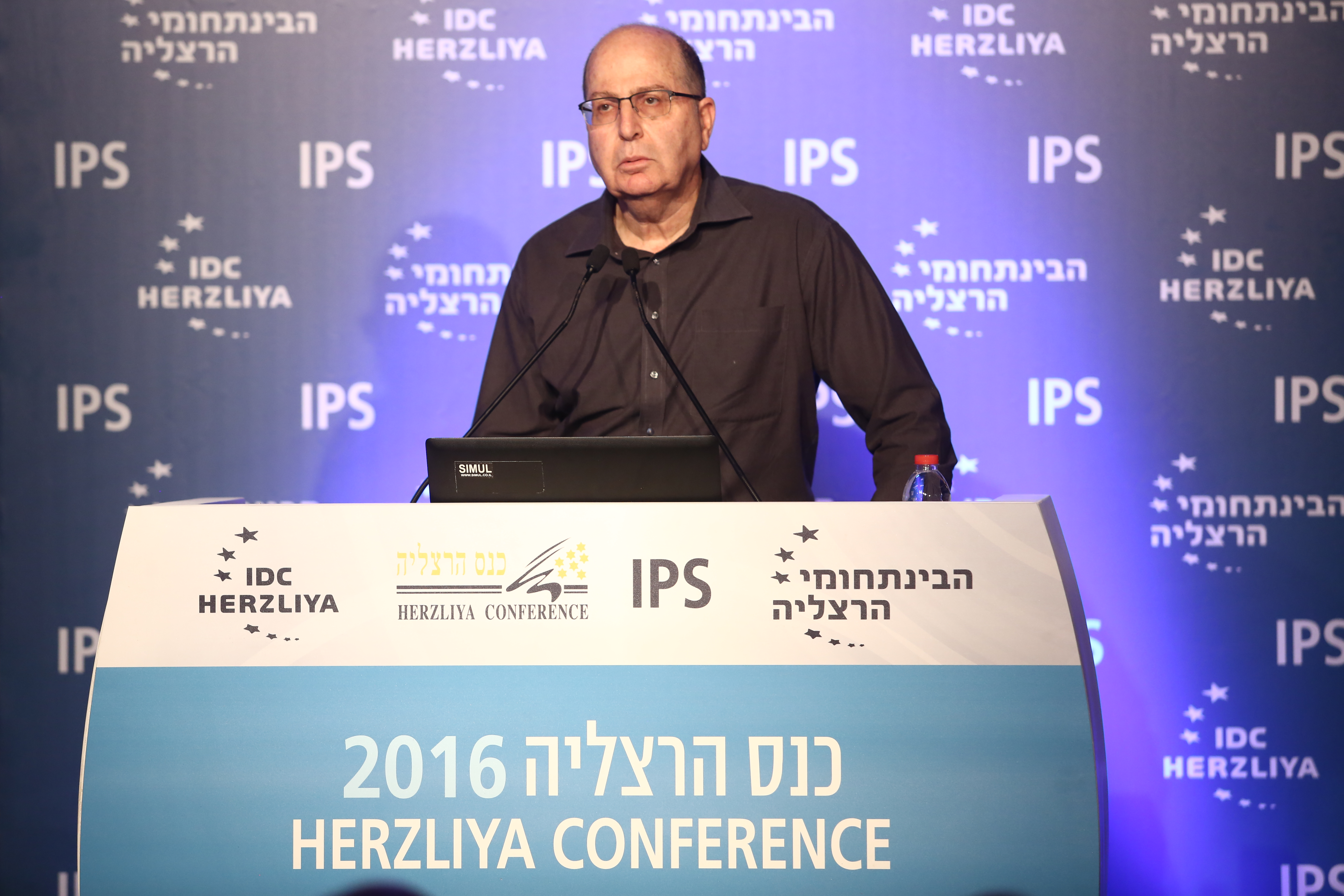 משה בוגי יעלון בכנס הרצליה 2016 של המכון למדיניות ואסטרטגיה במרכז הבינתחומי הרצליה